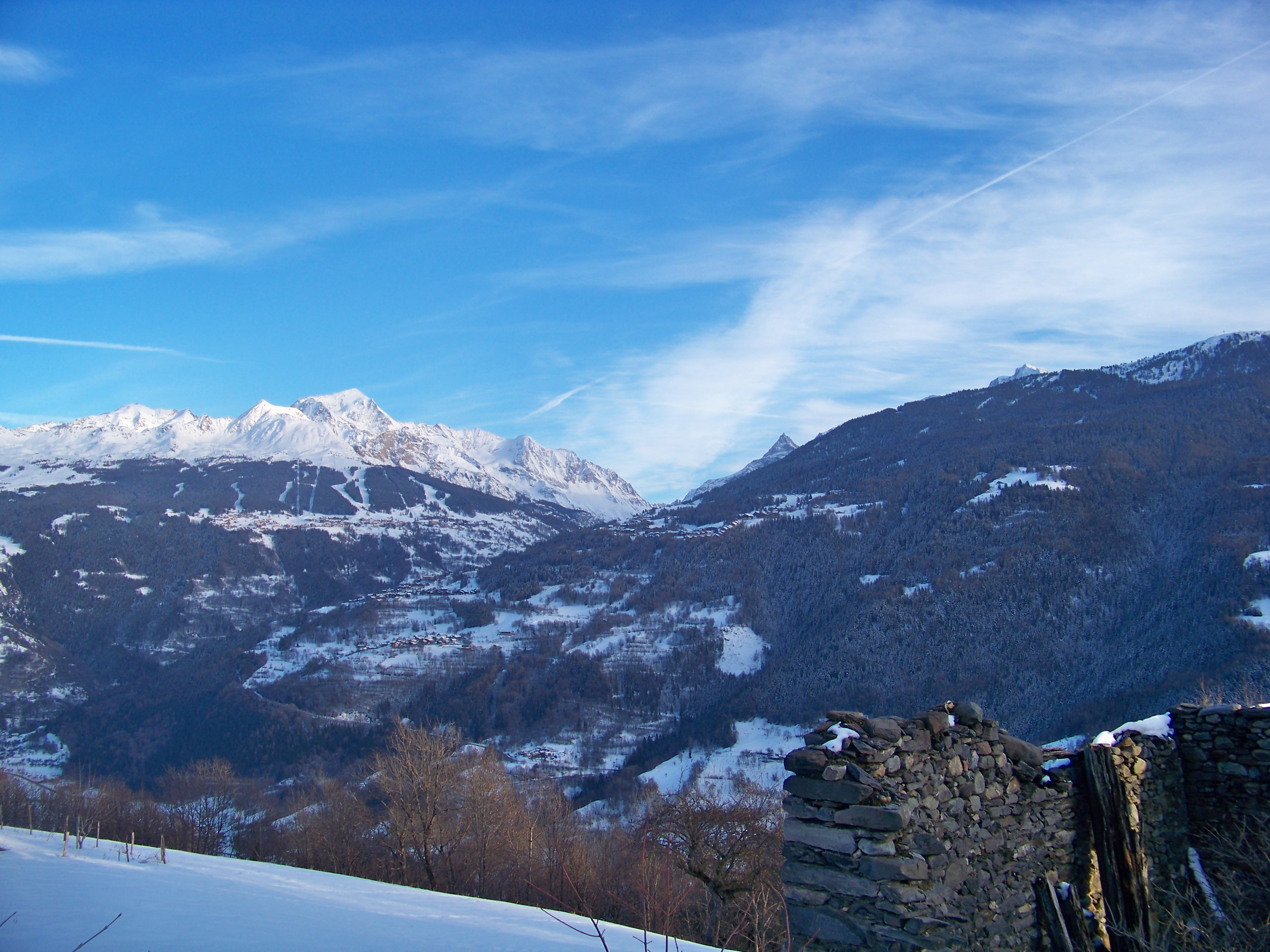 Station de ski vu de Valezan. Hiver.